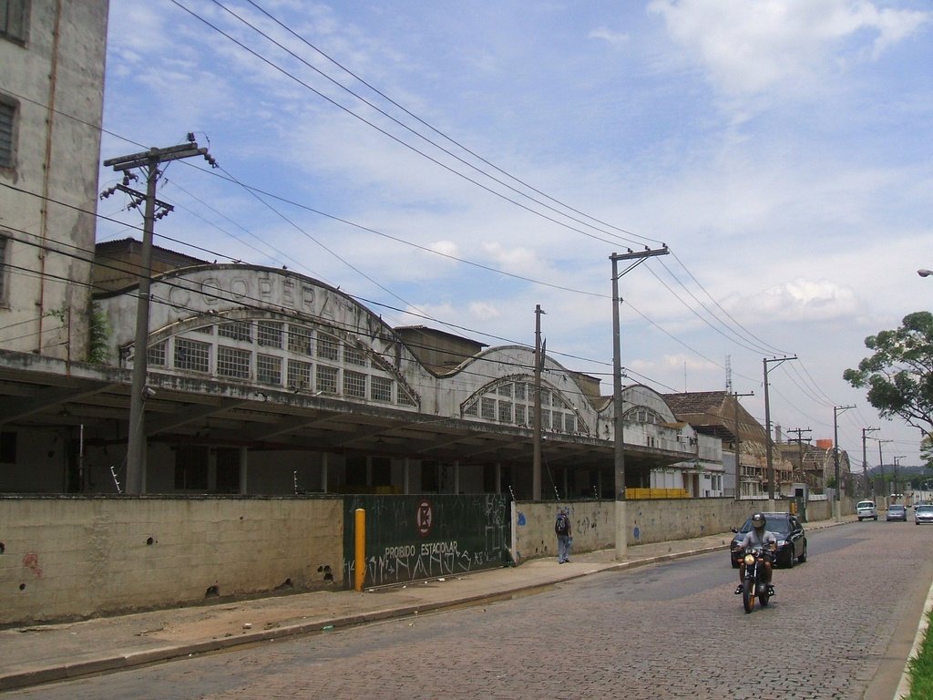 Antigos galpões da Cooperativa Agrícola de Cotia, no distrito do Jaguaré, cidade de São Paulo, Brasil